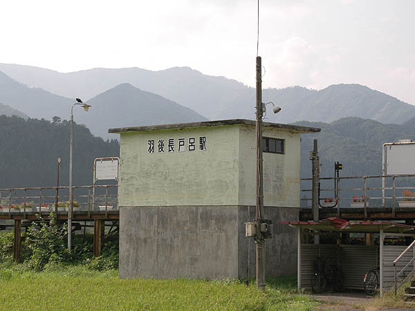 Ugo-Nagatoro Station, on the Akita Nairiku Jūkan Railway Akita Nairiku Line, Semboku, Akita, Japan